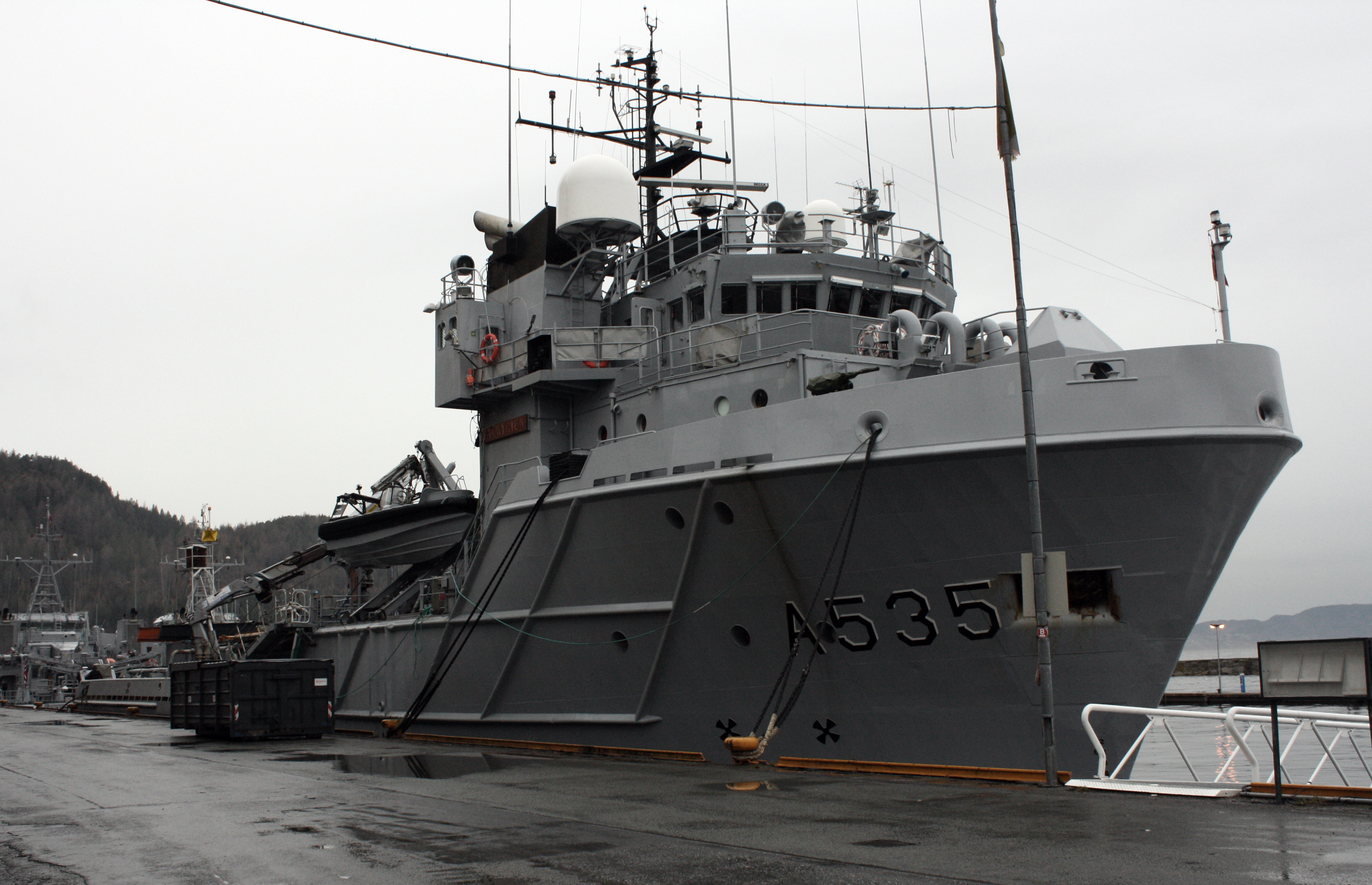 KNM Valkyrien ved kai i Ila.